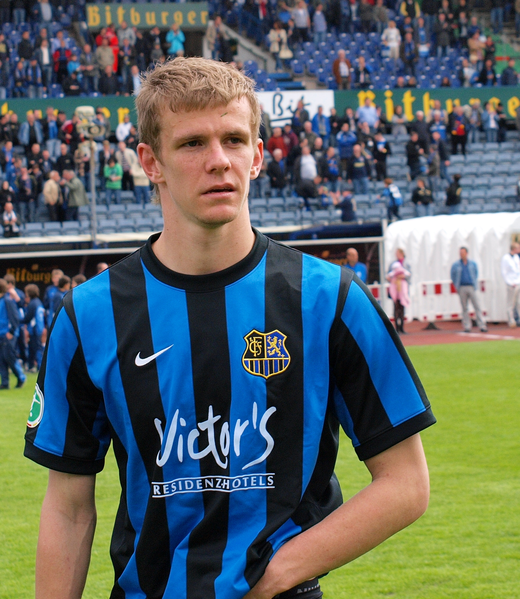 Dieses Foto zeigt Manuel Zeitz im Dress des 1.FC Saarbrücken im April 2011